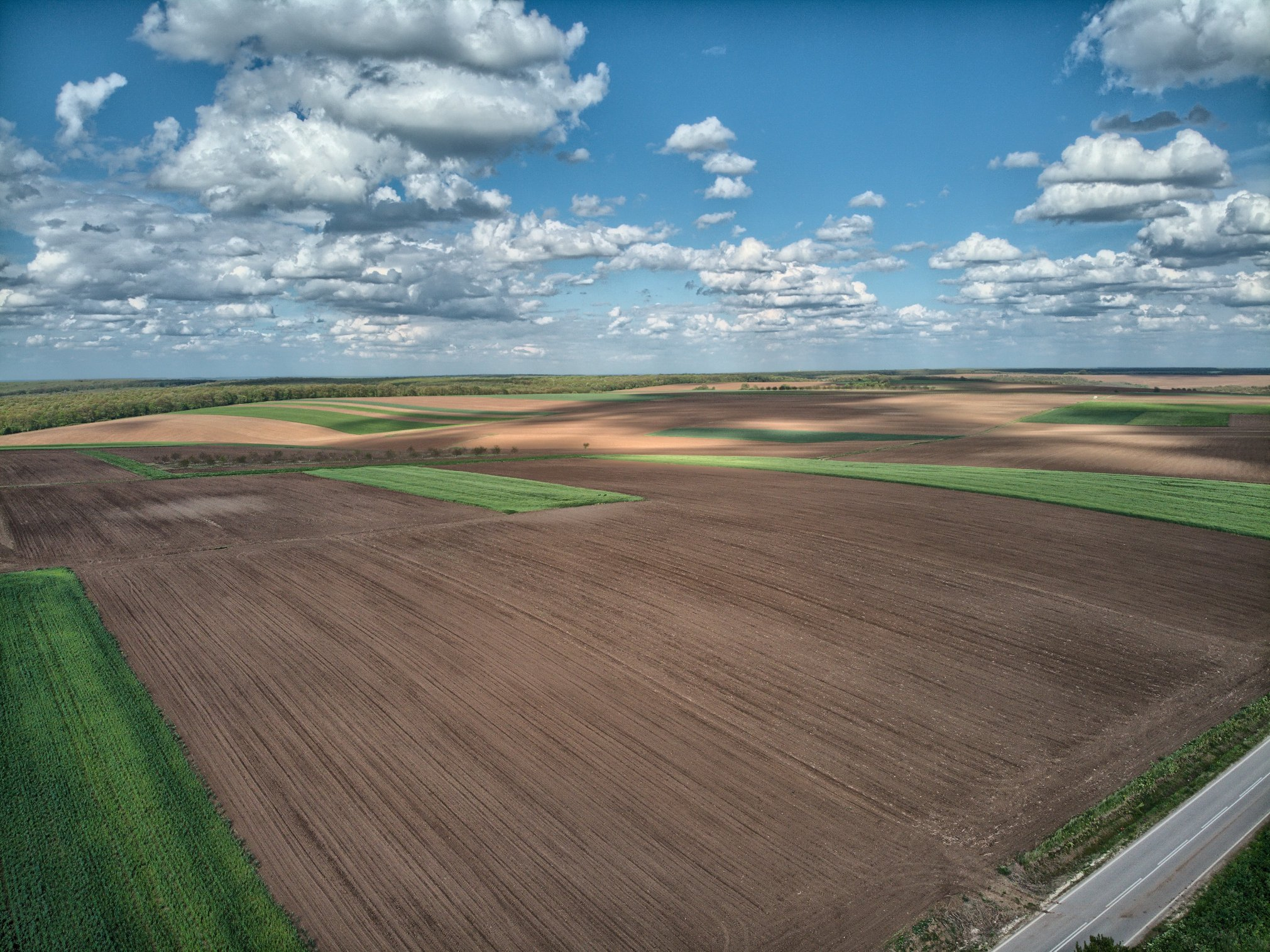 Listets